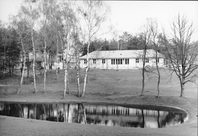 Berlin Olympisches Dorf